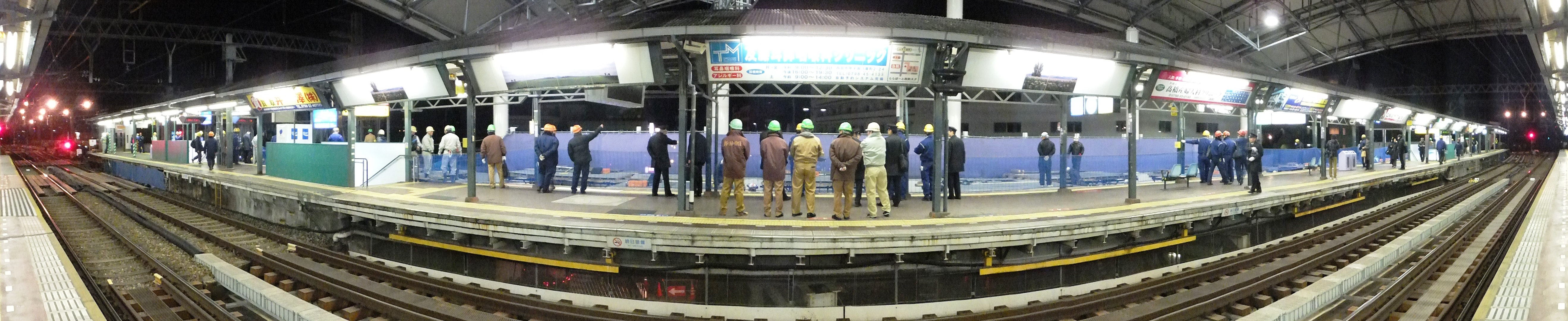 2015年2月20日の終電間際、1・2番ホームを拡張工事中。翌日始発より拡張されました。